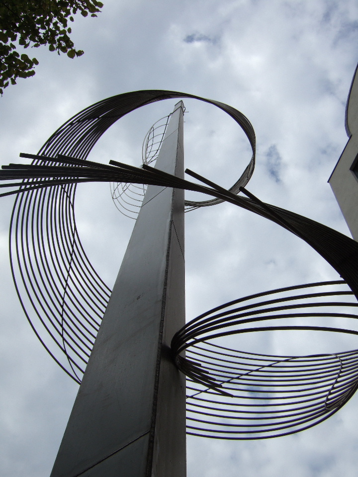 Hans-Volker Mixsa: Säule mit Spirale (1993), Skulptur beim Gebäude des Deutschen Sparkassen- und Giroverbands in Bonn